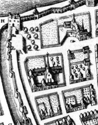 Bonn, Kloster Engelthal, Ausschnitt aus dem Stadtplan von Matthäus Merian, gedruckt 1646